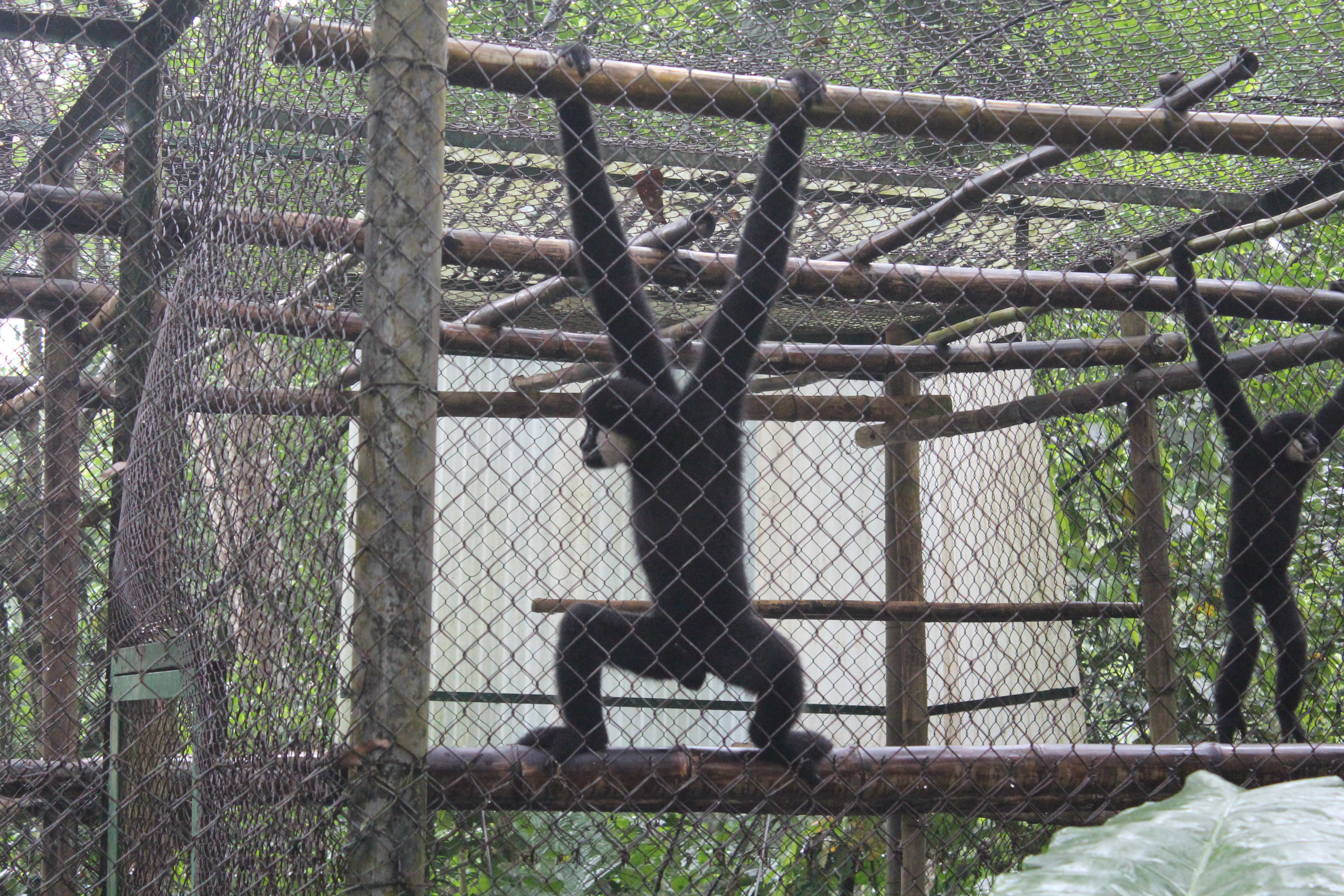 Vượn đen má trắng tại khu cứu hộ linh trưởng, vườn quốc gia Cúc Phương